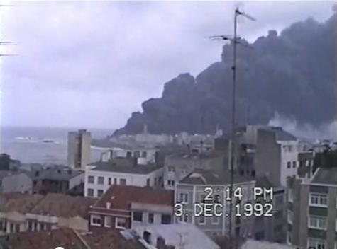 Imagen de videoaficionado durante el naufragio del petrolero Mr Egeo, La Coruña, España. Año 1992.